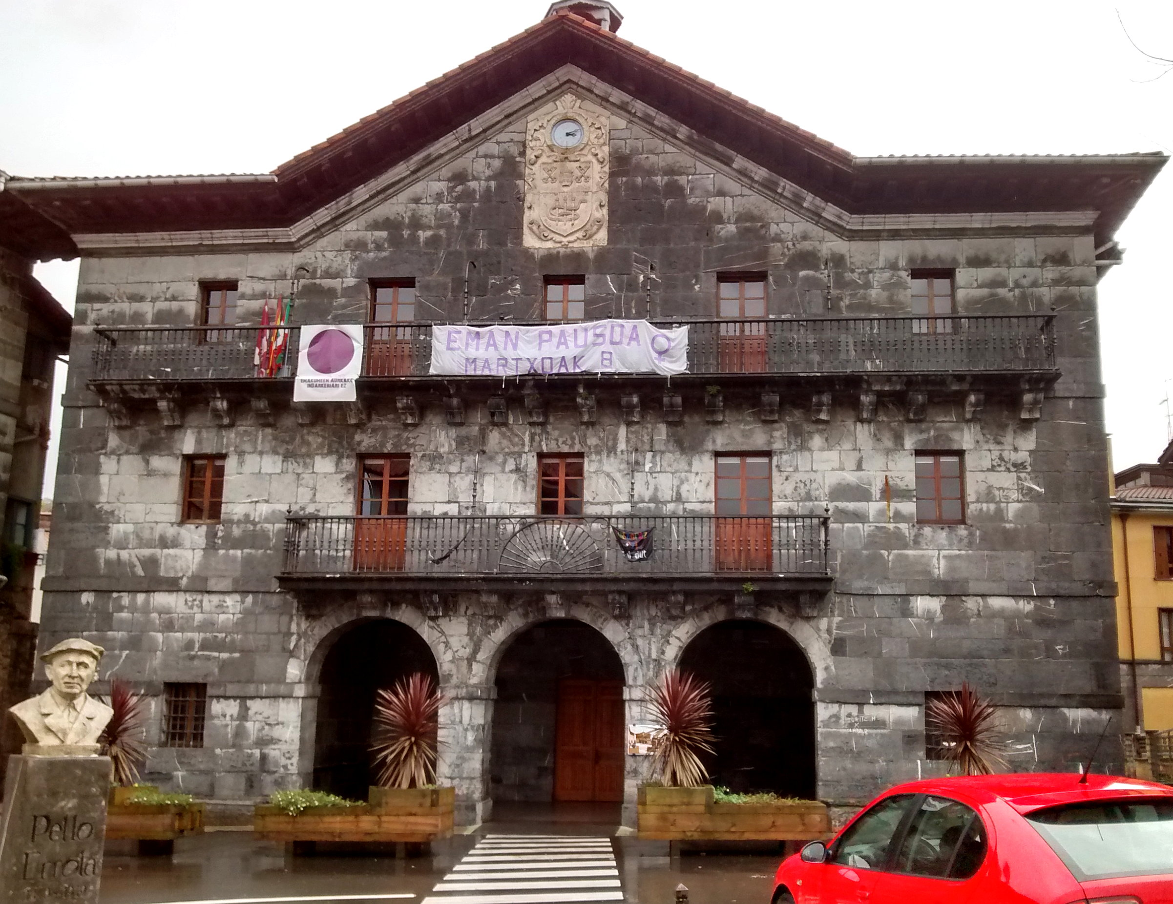 Asteasuko Udaletxea